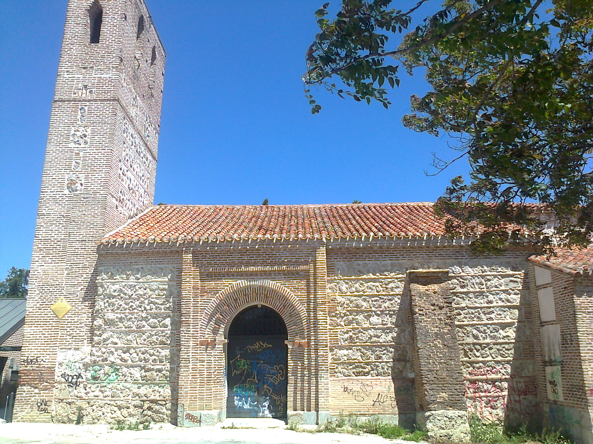 Vista lateral completa.